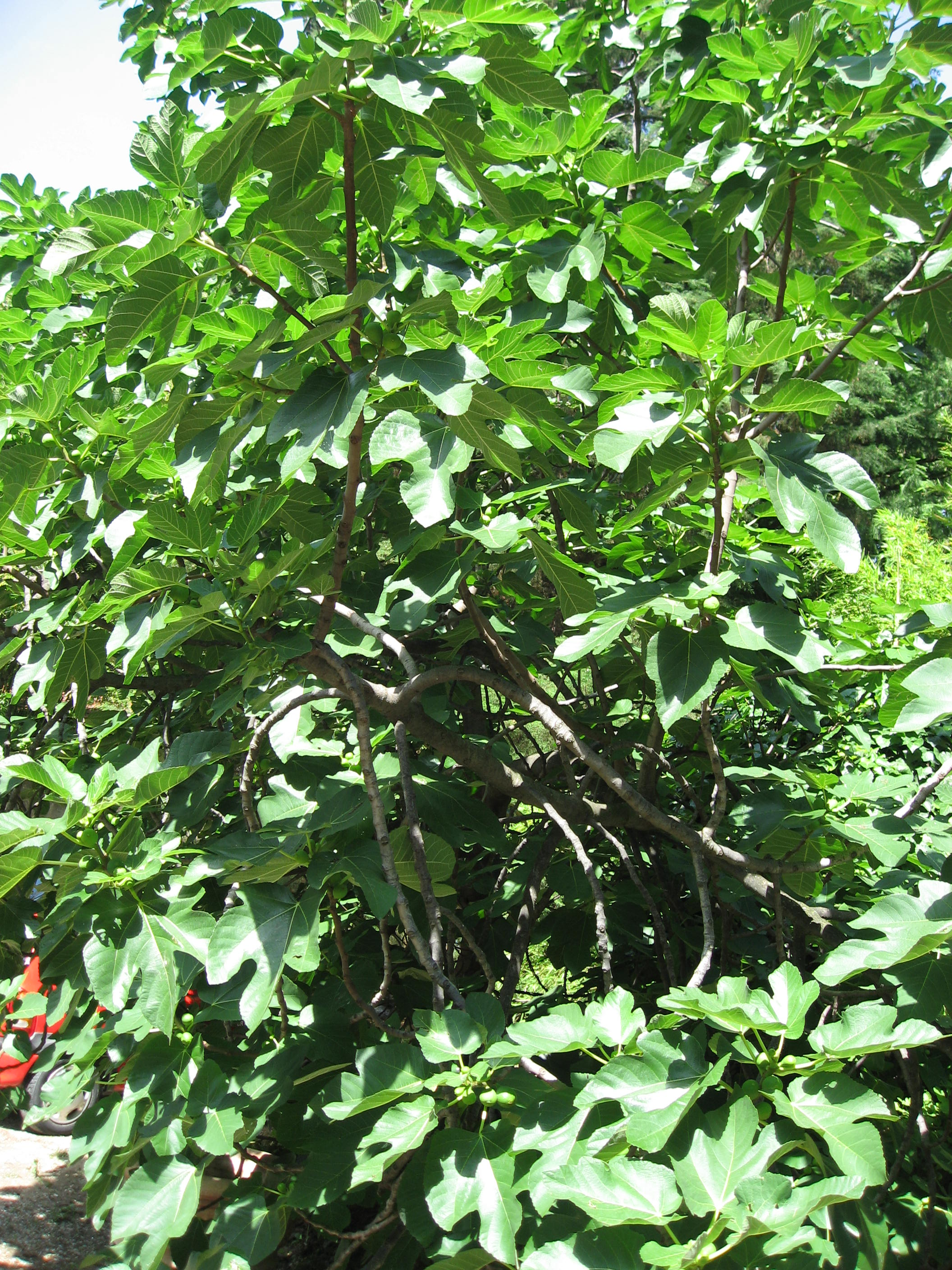 Ficus carica in Giardino dei Semplici di Firenze Map: 43° 46' 45" N 11° 15' 39" E